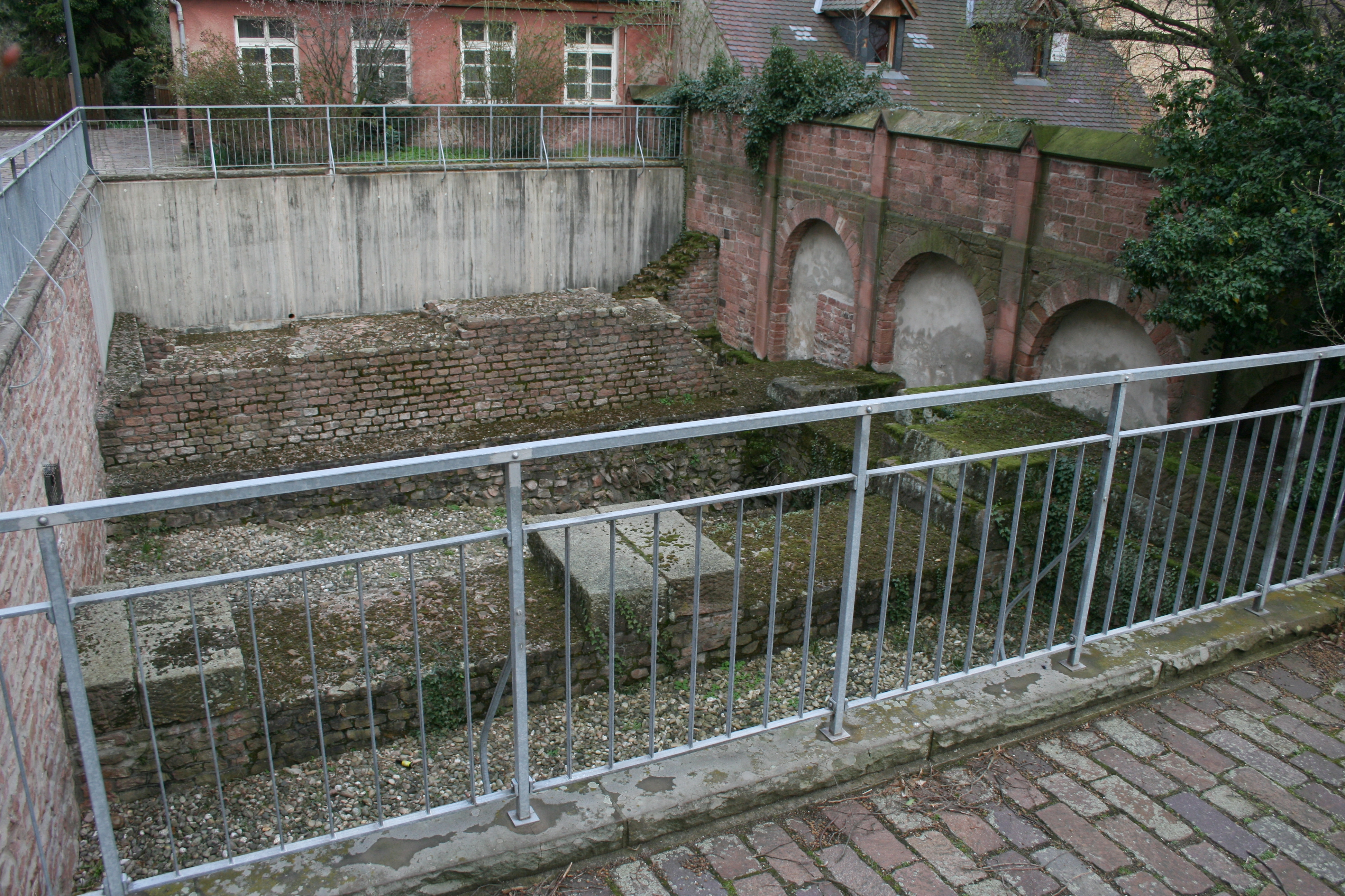 Rekonstruierte Fundamente der Basilika am römischen Forum in Ladenburg vor der heutigen St. Gallus-Kirche.